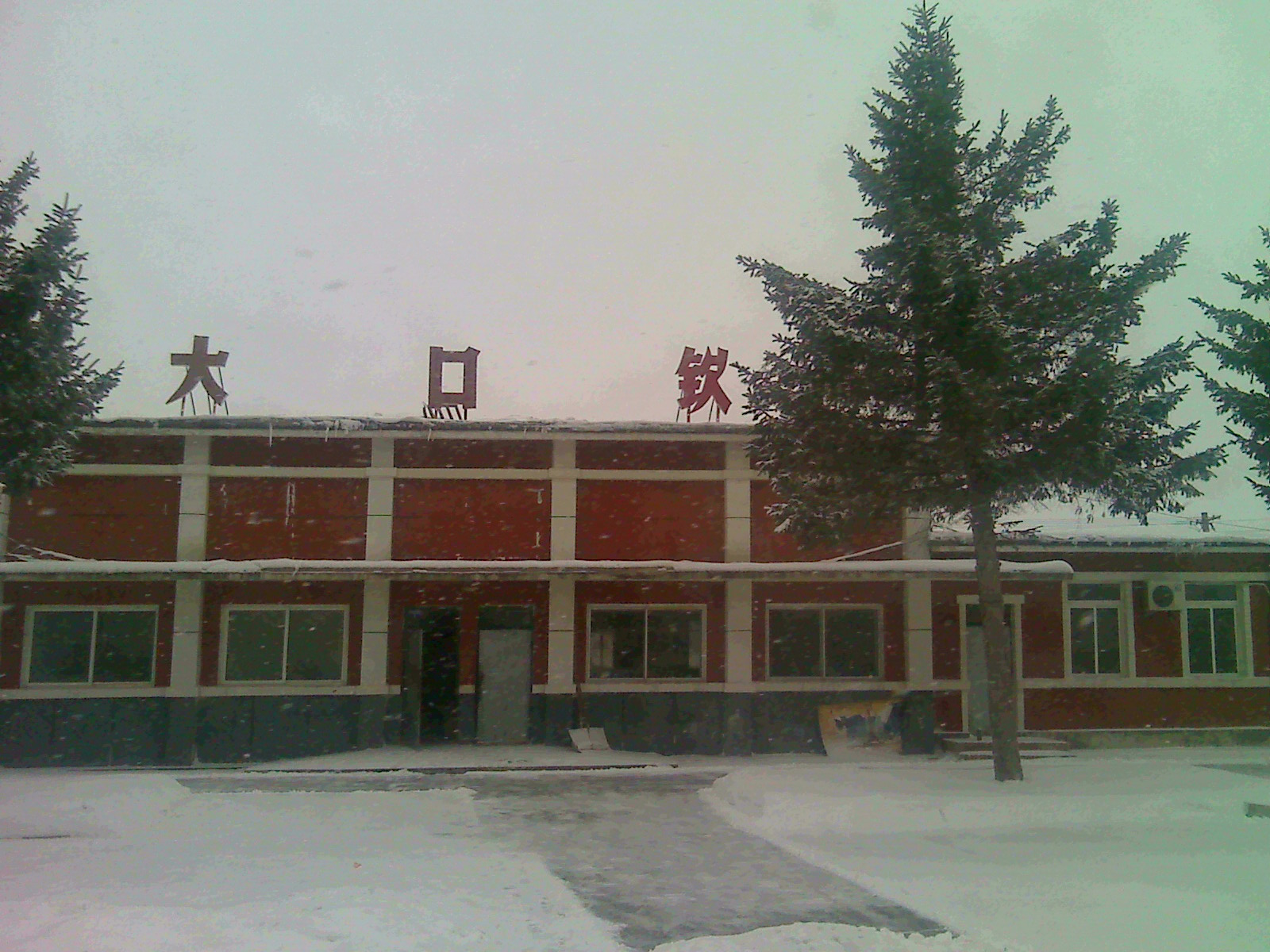 大口钦站候车室